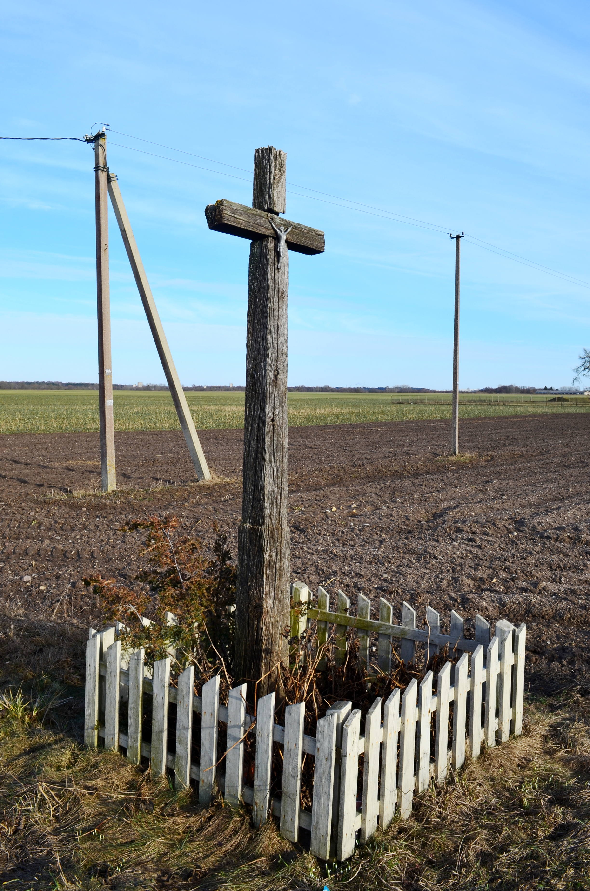 Sviliukų medinis kryžius, Kėdainių raj.